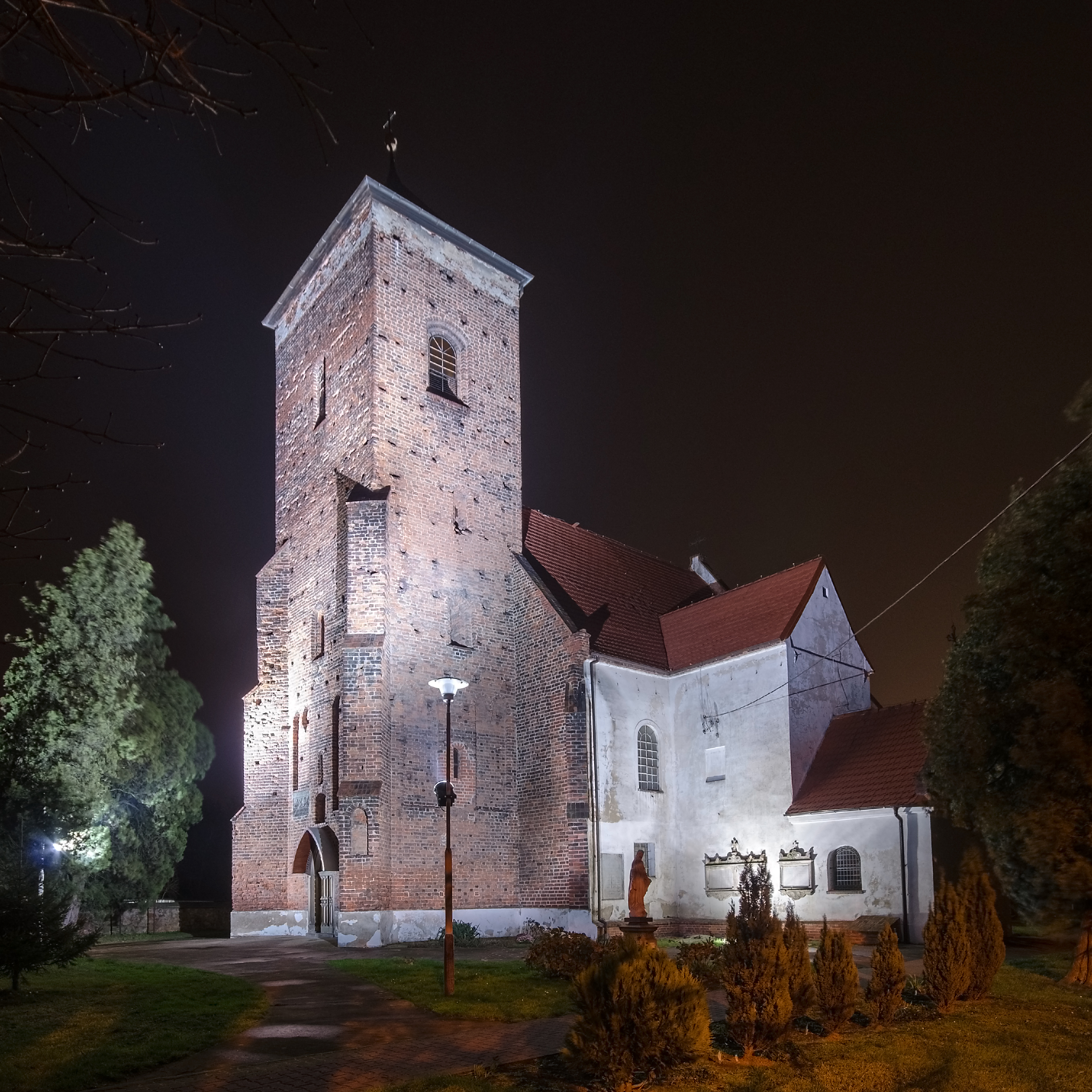 Sośnica, kościół par. p.w. Podwyższenia Krzyża, kon. XIII, 1487-1504, 1776